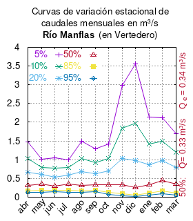 Curva de Variación Estacional del río Manflas en Vertedero. # cita publicación # | apellido = Dirección General de Aguas # | nombre = # | enlace-autor = Ministerio de Obras Públicas (Chile) # | título = Diagnóstico y clasificación de los cursos y cuerpos de agua según objetivos de calidad. Cuenca Río Manflas # | ubicación = Santiago de Chile # | editorial = Ministerio de Obras Públicas (Chile) # | año = 2004 # | edición = # | url = # | urlarchivo = # | fechaarchivo = # | ref = harv # Tabla 4.1 (m3/s) pág. 36 mes 5% 10% 20% 50% 85% 95% abr 1.479 1.025 0.667 0.317 0.158 0.121 may 1.007 0.797 0.600 0.349 0.179 0.121 jun 1.052 0.771 0.541 0.299 0.178 0.147 jul 0.992 0.790 0.599 0.354 0.185 0.126 ago 1.492 1.035 0.675 0.321 0.160 0.122 sep 1.292 0.925 0.629 0.325 0.178 0.142 oct 1.426 1.039 0.708 0.340 0.138 0.081 nov 2.986 1.843 1.027 0.336 0.085 0.038 dic 3.558 1.981 0.977 0.257 0.056 0.026 ene 2.131 1.416 0.863 0.335 0.104 0.053 feb 2.111 1.490 0.976 0.435 0.161 0.090 mar 1.695 1.203 0.790 0.345 0.111 0.048 This plot was created with Gnuplot.